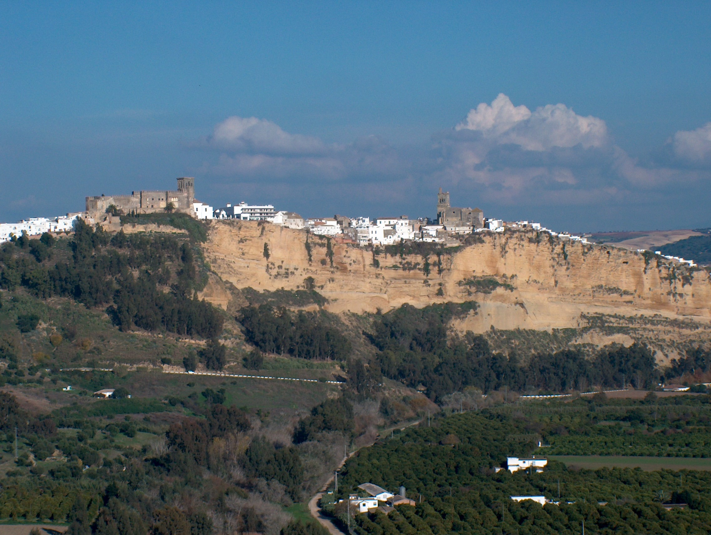 Arcos de la Frontera (Cádiz) Tomada por Alexwing 7 de Diciembre 2004